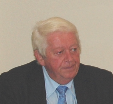 Josef Vondrášek (2014)